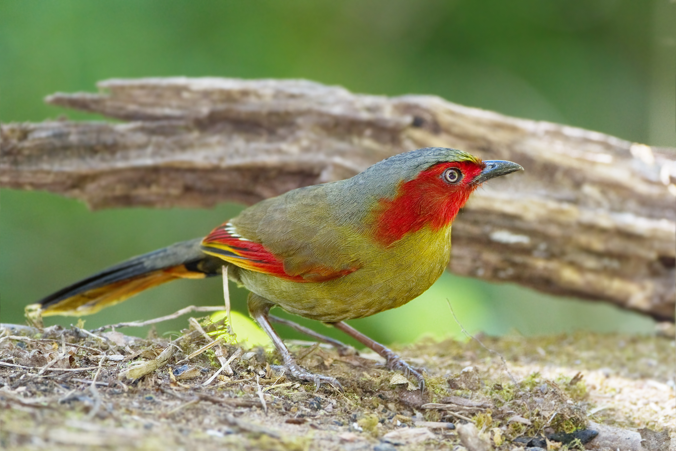 Scarlet-faced Liocichla Liocichla ripponi (syn. L. phoenicea ripponi), Chiang Mai, Thailand